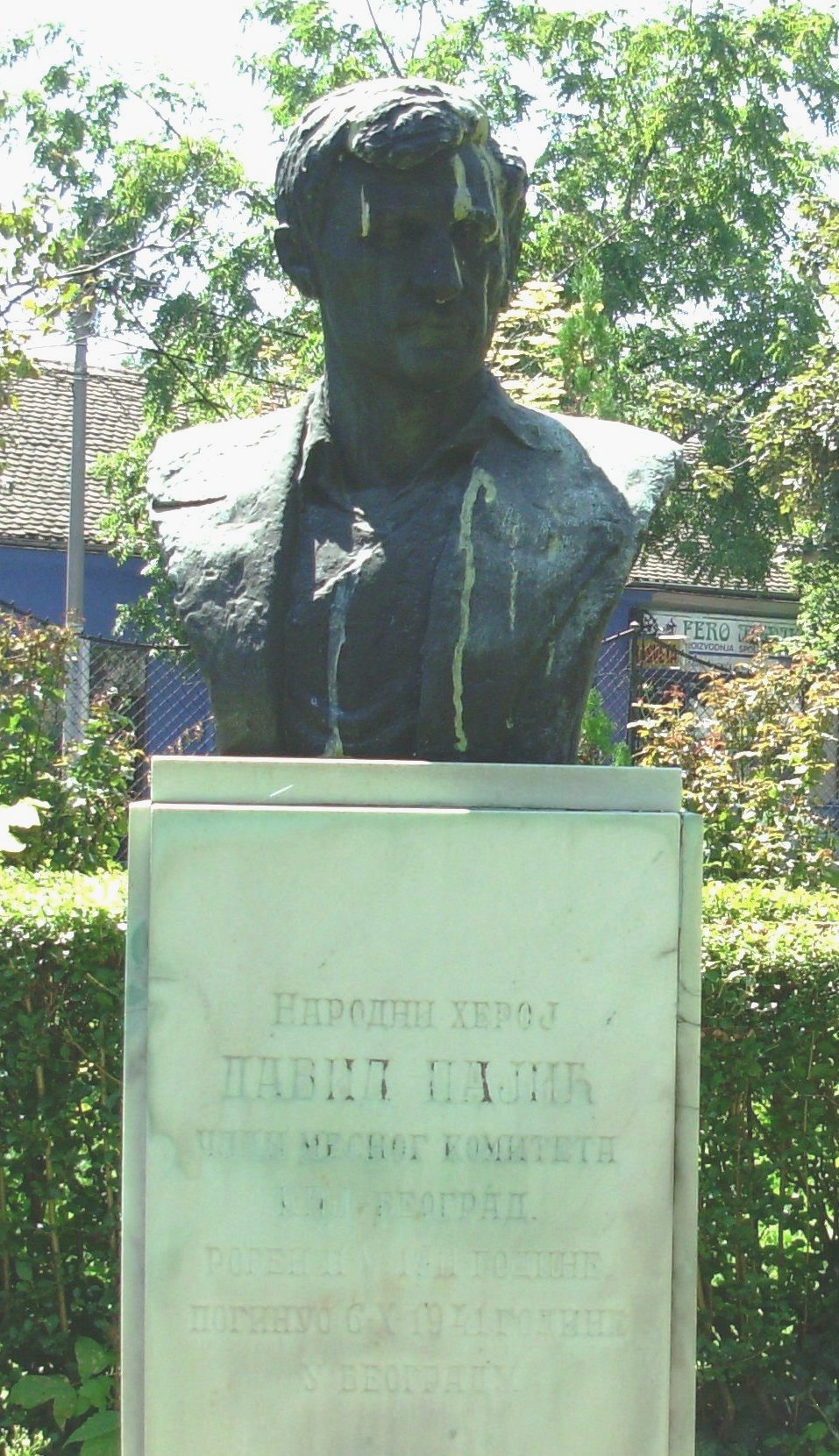 Spomenik narodnom heroju Davidu Pajiću Daki, koji se nalazi u krugu firme istog imena u Beogradu, Vonizelosova ulica, na Starom Gradu. Firma se bavi izradom i popravkom liftova. Obzirom da je spomenik u krugu fabrike trebalo mi je odobrenje direktorke firme, koja mi je odobrila ulaz i fotografisanje, na čemu se zahvaljujem! Slikao Goldfinger.